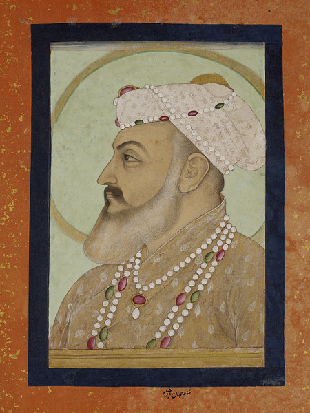 Mughal emperor Shah Jahan in old age.